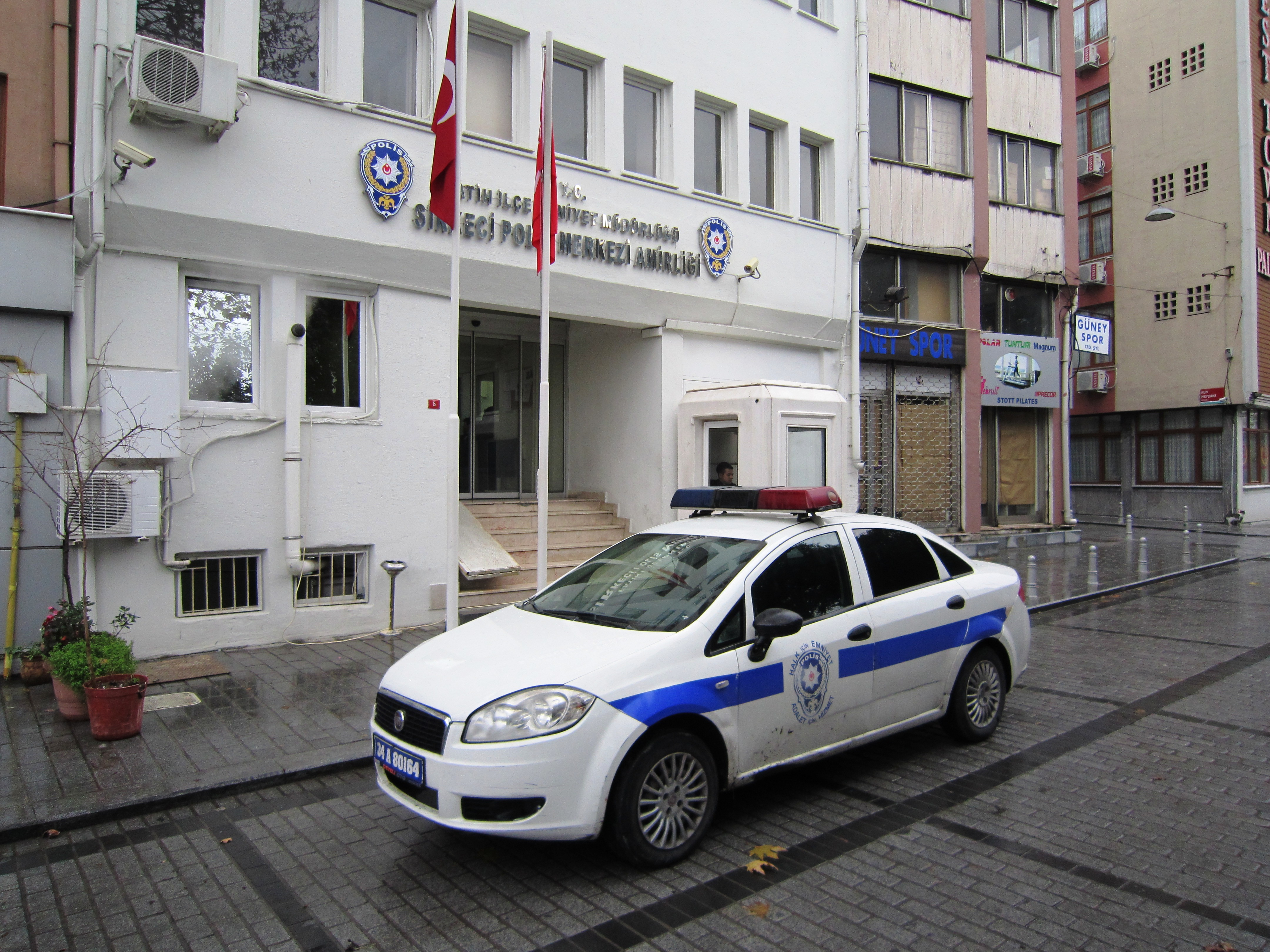 politieauto bij politiebureau in Istanboel Turkije